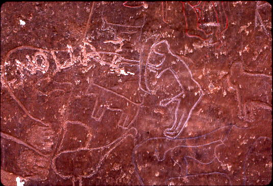 Gravure préhistorique de la région d'Ain Sefra, Thyout, Algérie